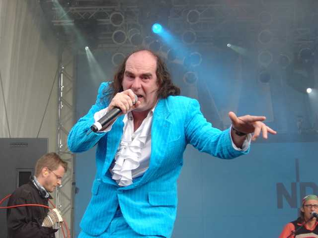 Guildo Horn während des E.ON Hanse Cup